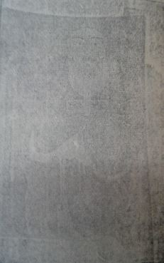 황의돈의 69쪽에 있는 이순신 장군 초상화.